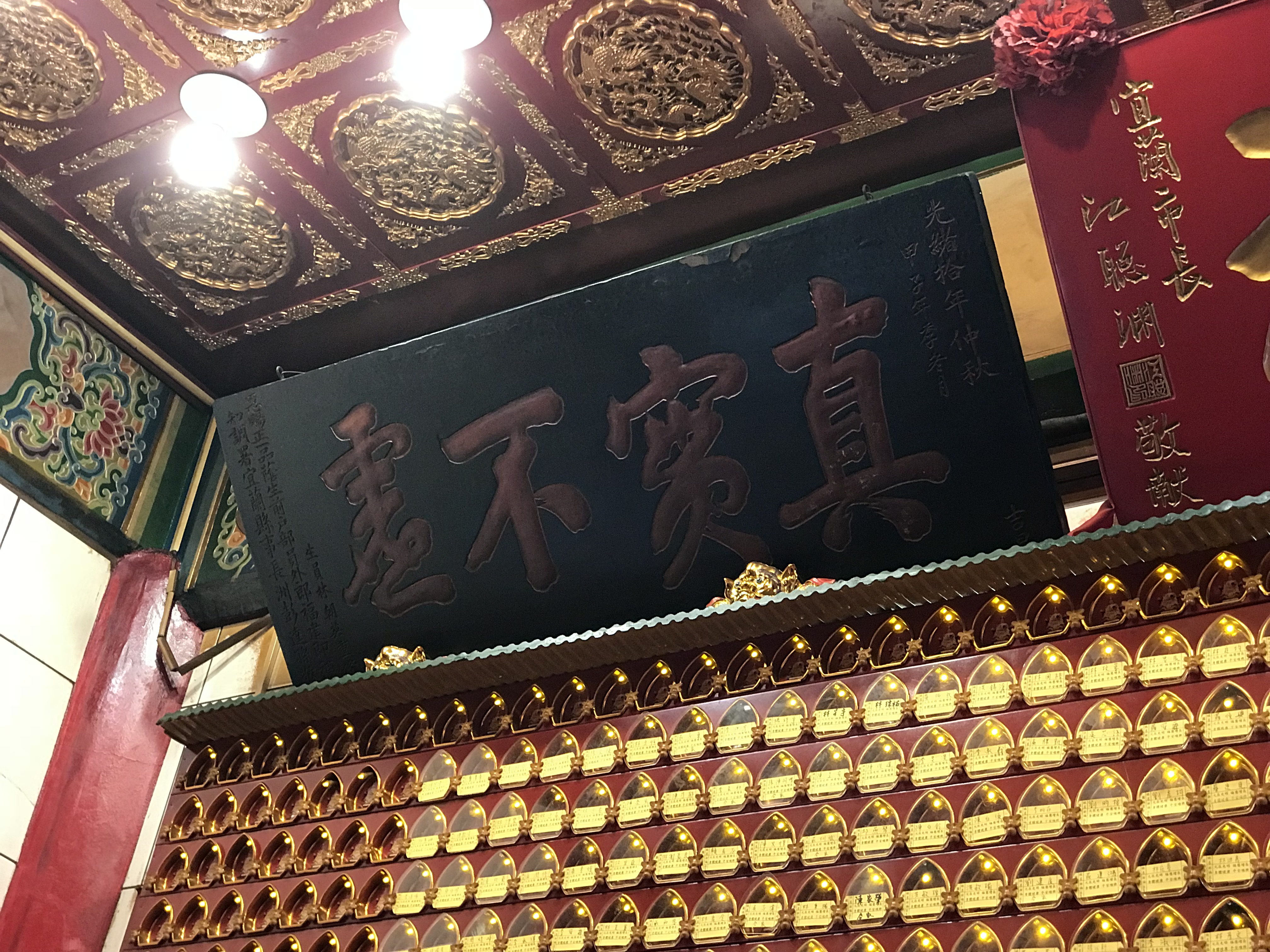 中文（台灣）: 南興廟裡彭達孫所贈送的「真實不虛」匾額